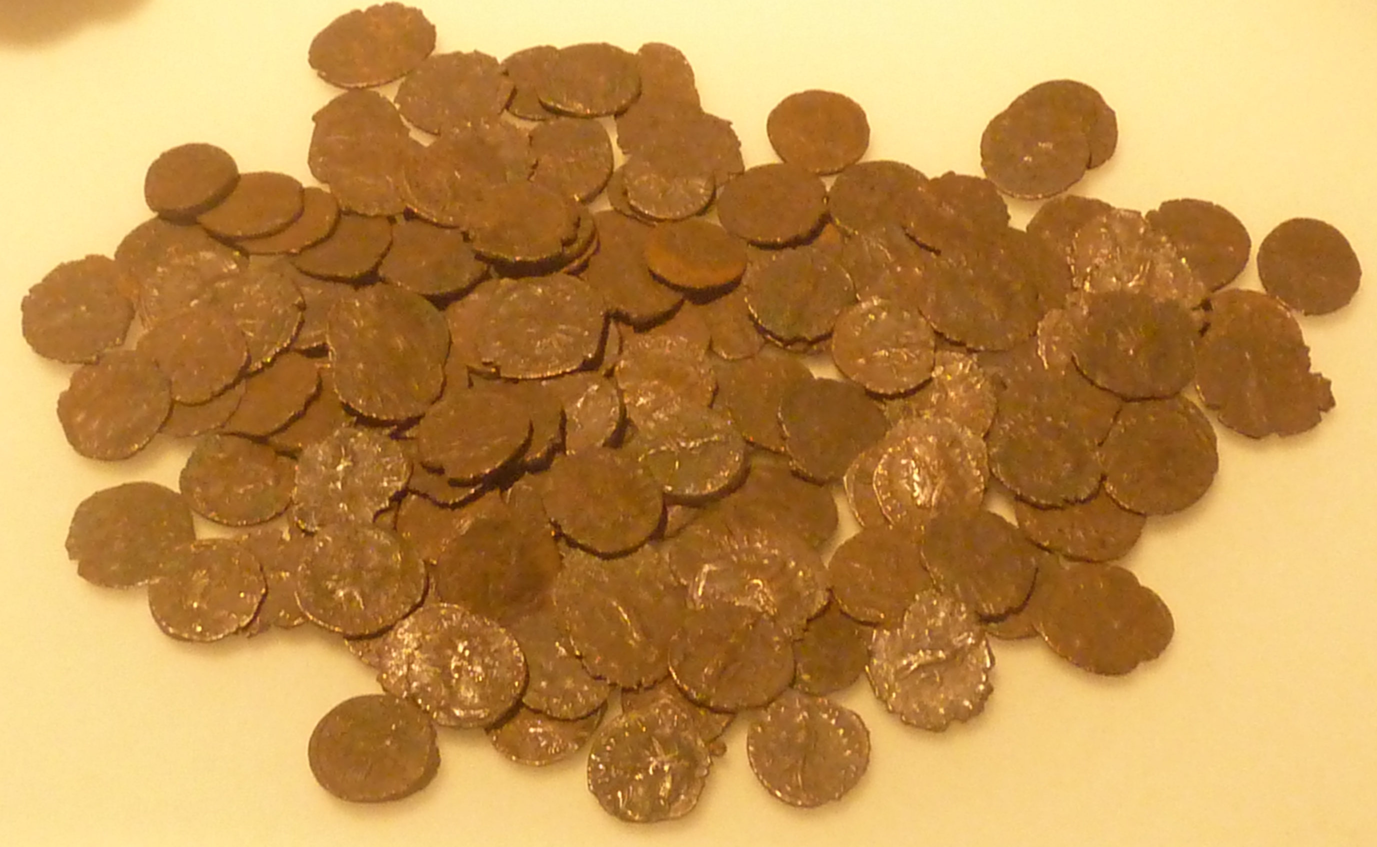 Le trésor de Pannecé II formé de monnaie romaine, des antoniniens de Tétricus Ier (271-274 après J.-C.). Le trésor de Pannecé II a été découvert en 2002 dans la commune de Pannecé (Loire-Atlantique). Il se trouve au Musée d'histoire et d'archéologie de Vannes